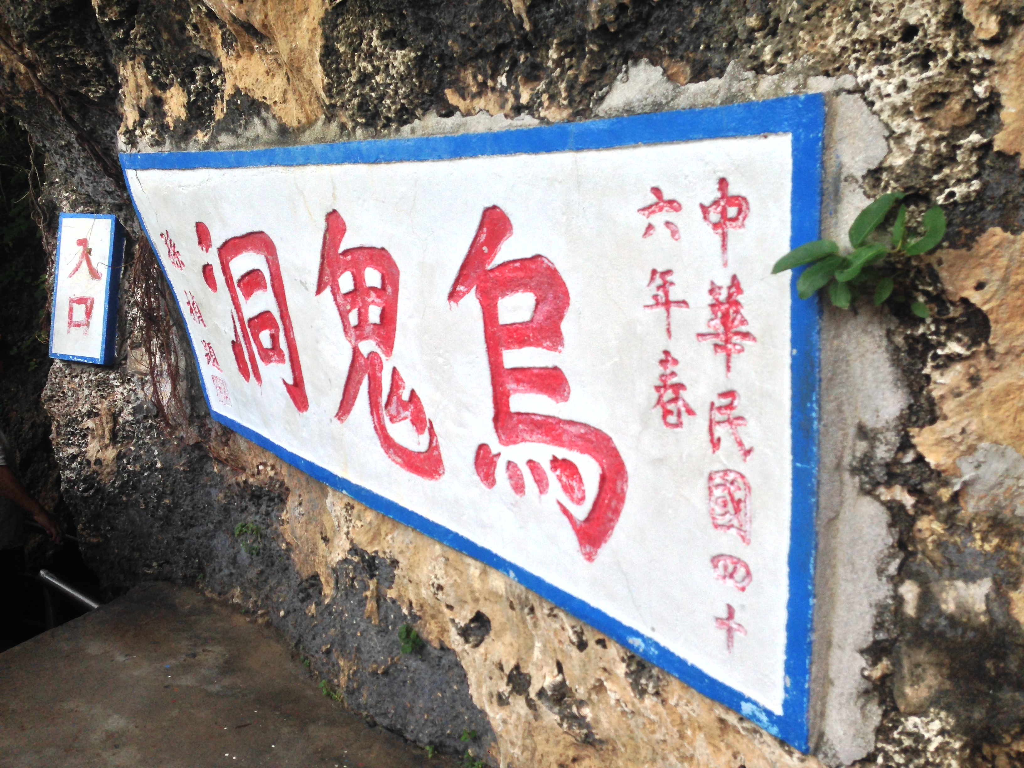 中文（台灣）: 烏鬼洞入口石碣